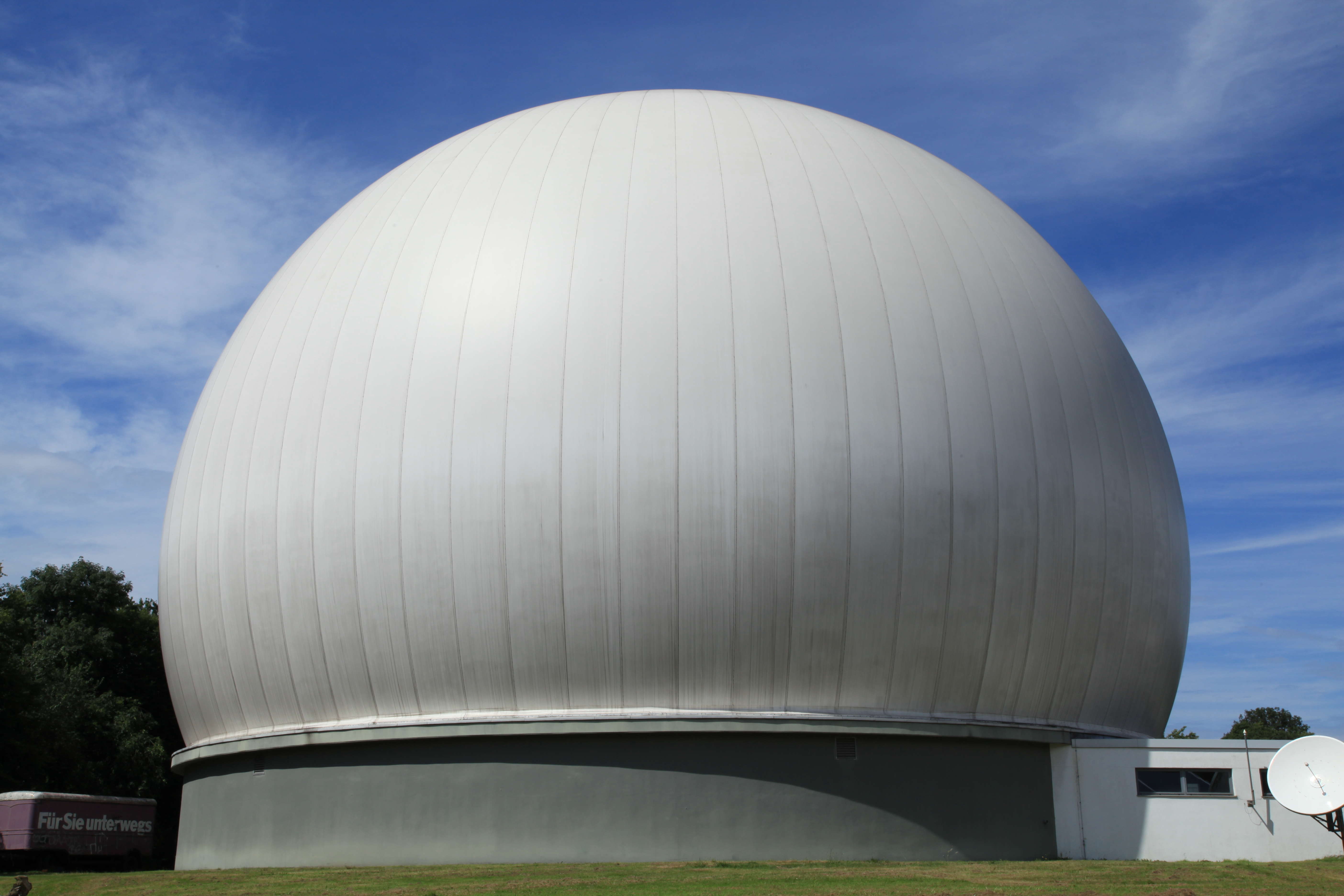 Sternwarte Bochum an der Blankensteiner Straße in Bochum